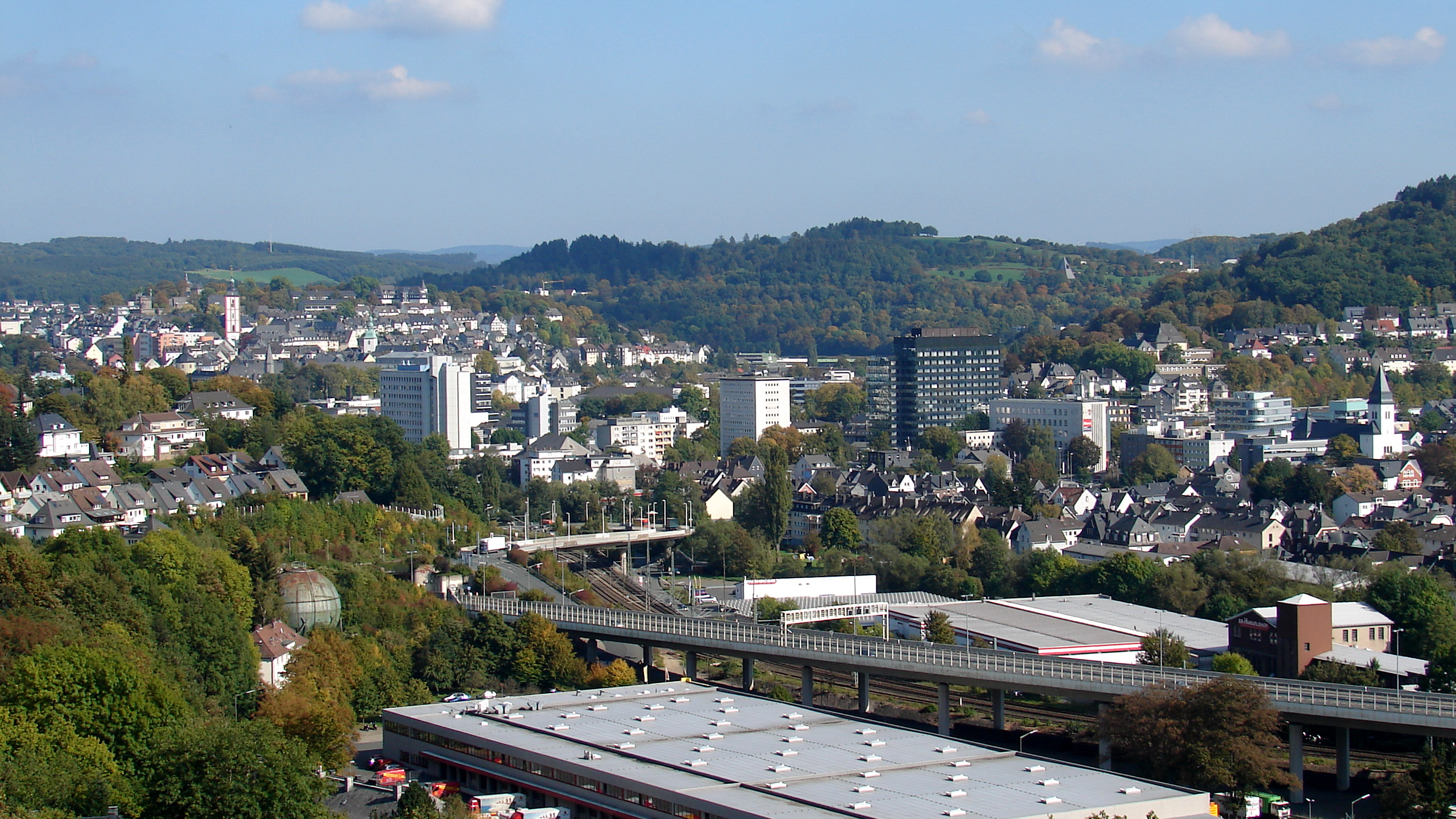 Siegen liegt im Siegerland in einem verzweigten Talkessel der oberen Sieg, in die innerhalb des Stadtgebiets die Fließgewässer Ferndorf und Weiß münden. Vom Talkessel zweigen zahlreiche Nebentäler ab. Die Höhen der umgebenden Berge sind, sofern nicht besiedelt, von Niederwald bedeckt.